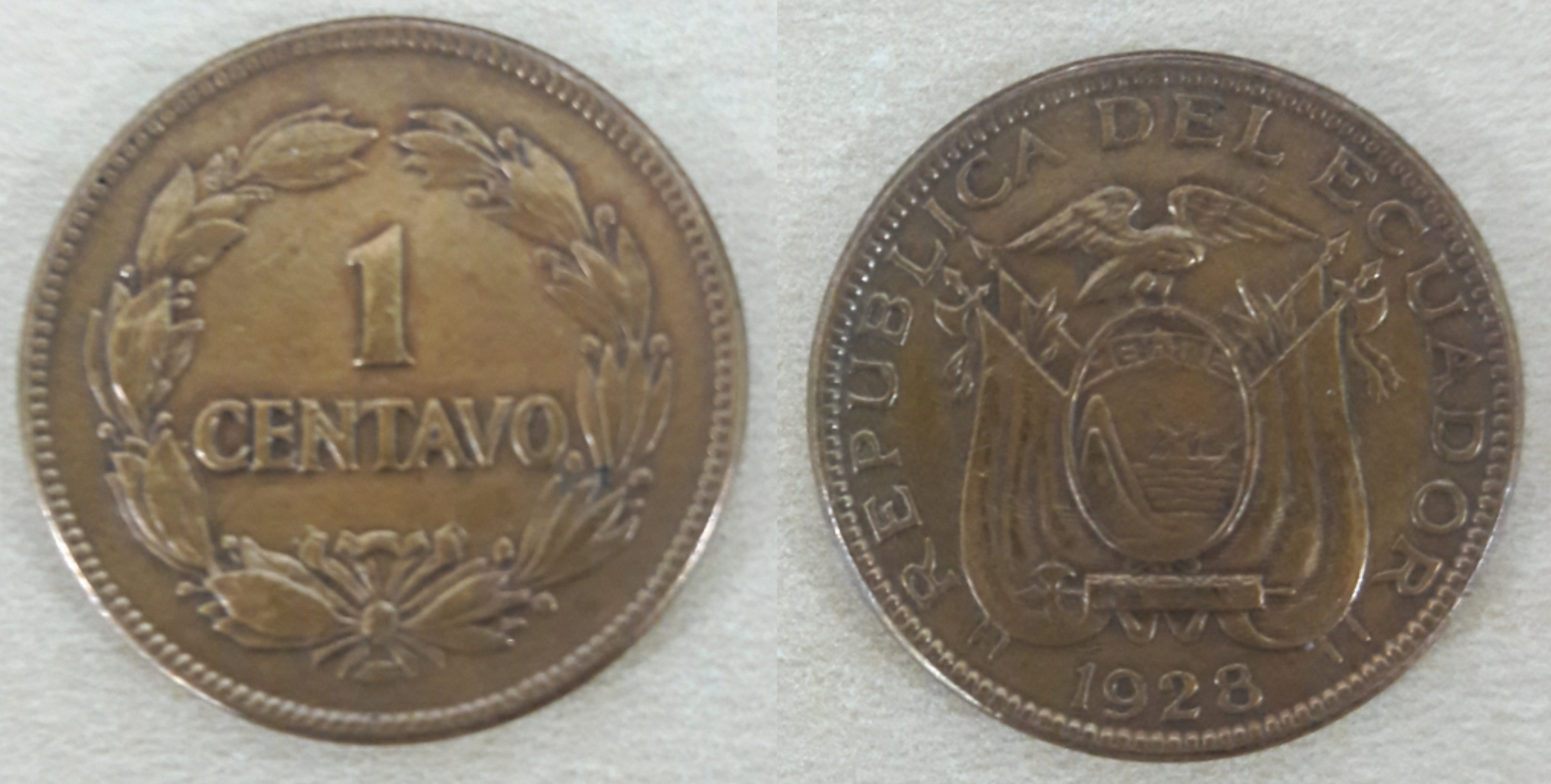 1 centavo ecuatoriano 1928